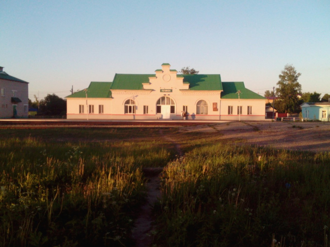 Вид на станцию Починок